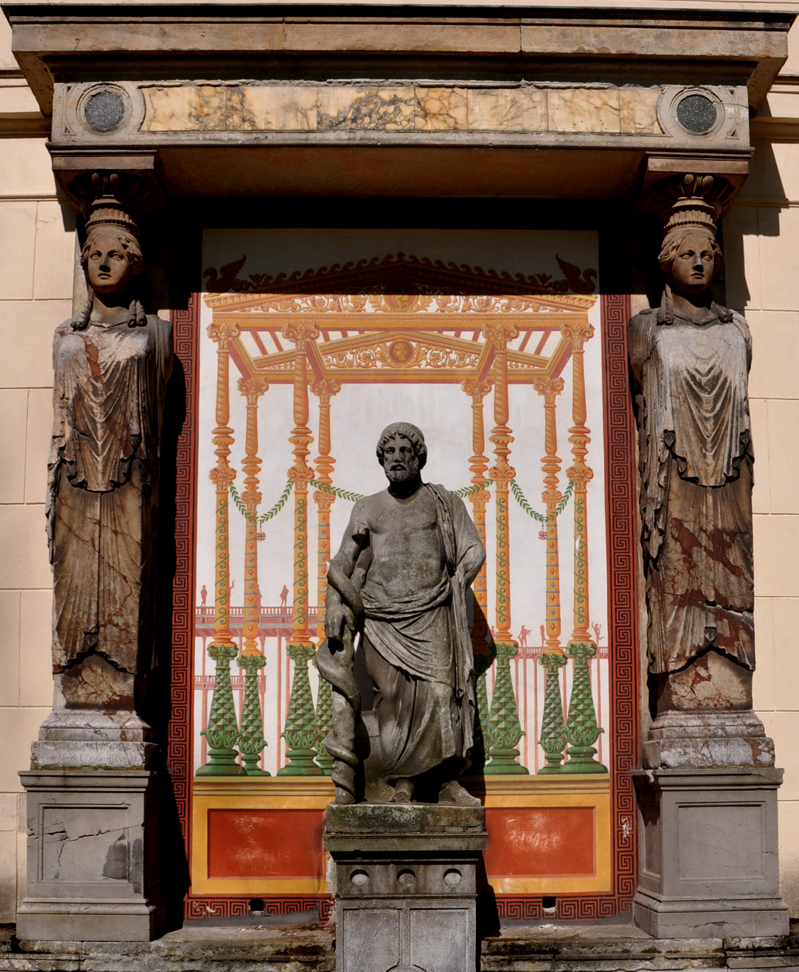 Park Klein-Glienicke, Wandbild an der Ostfassade des Casinos